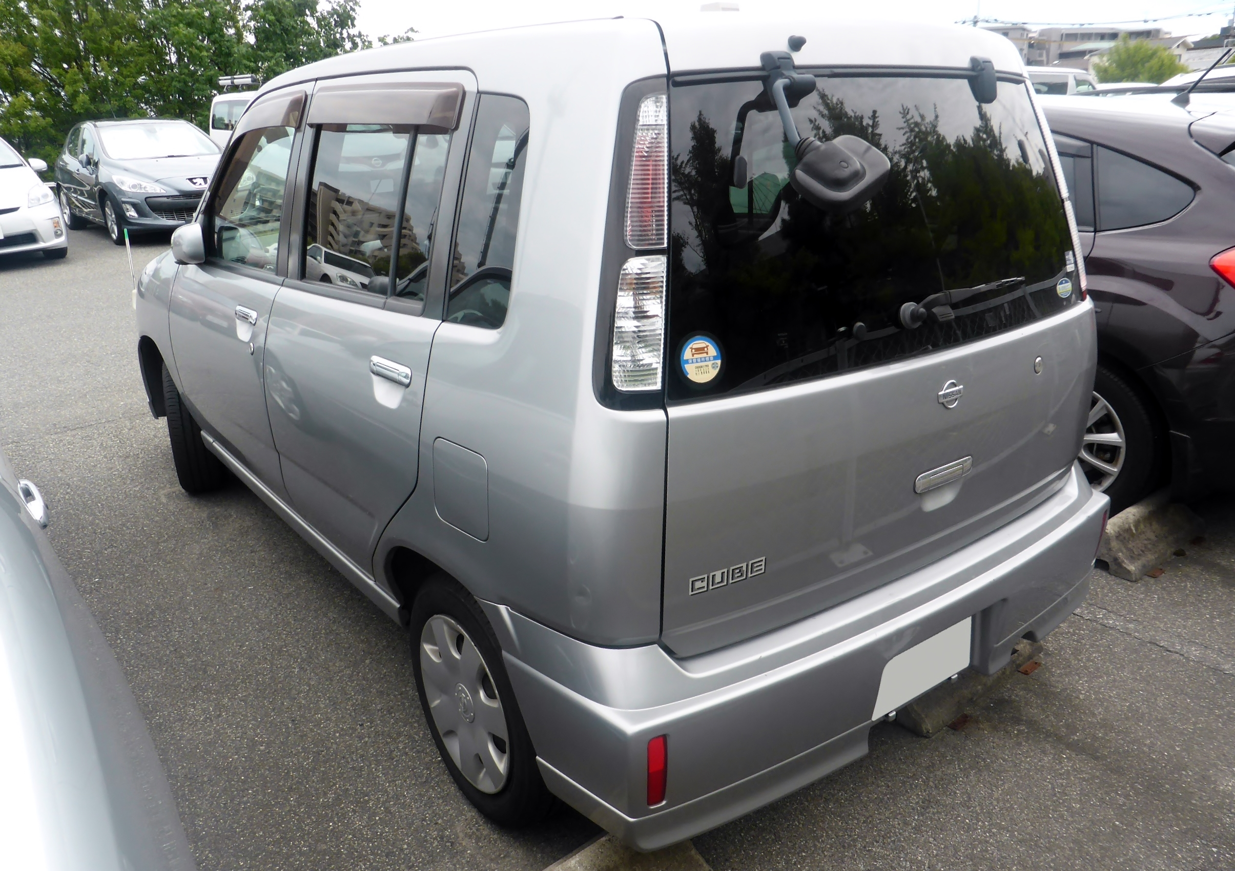 Z10型日産・キューブプレミアムをリアから撮影。